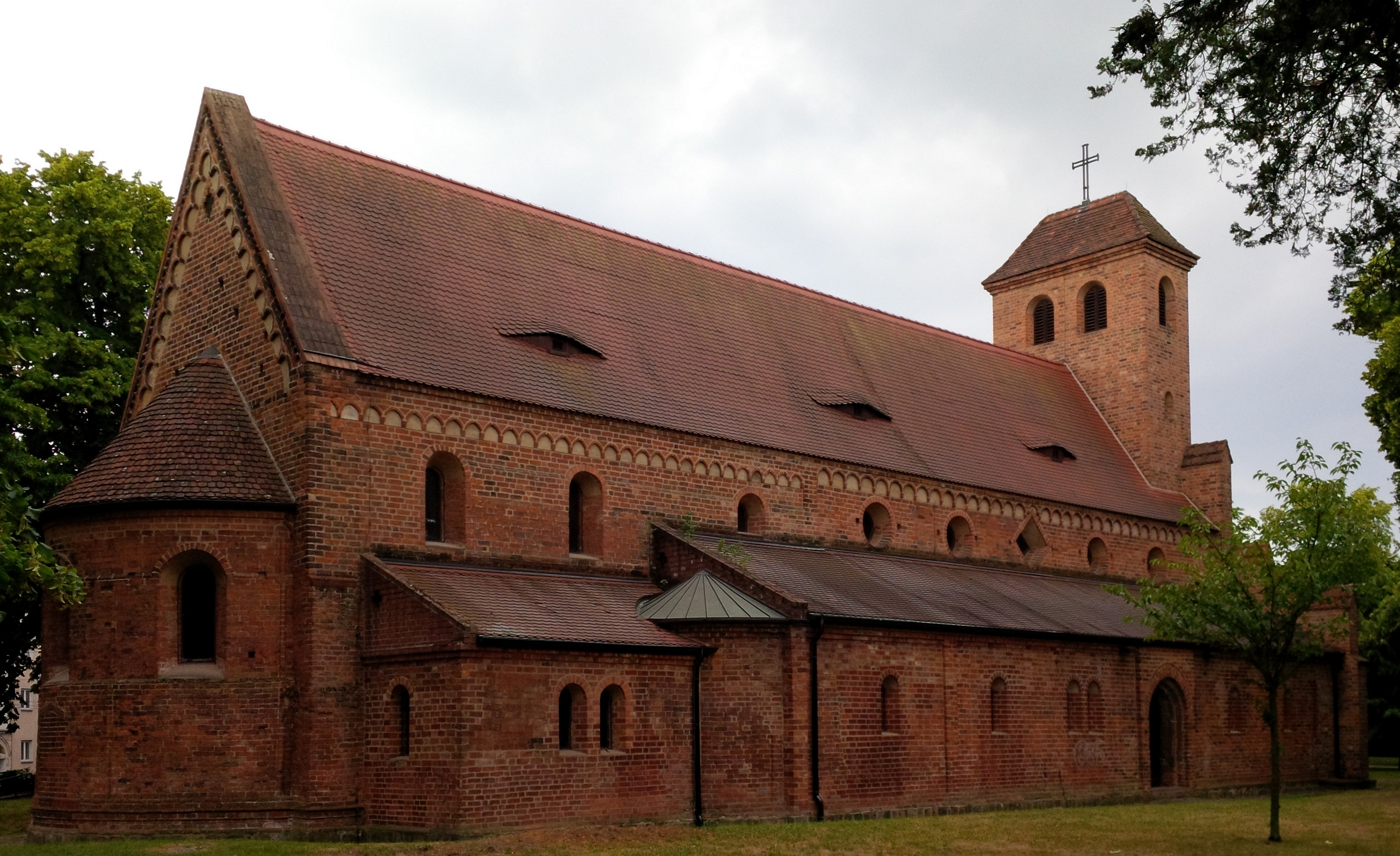 romanische kirche st. nicolai in brandenburg an der havel